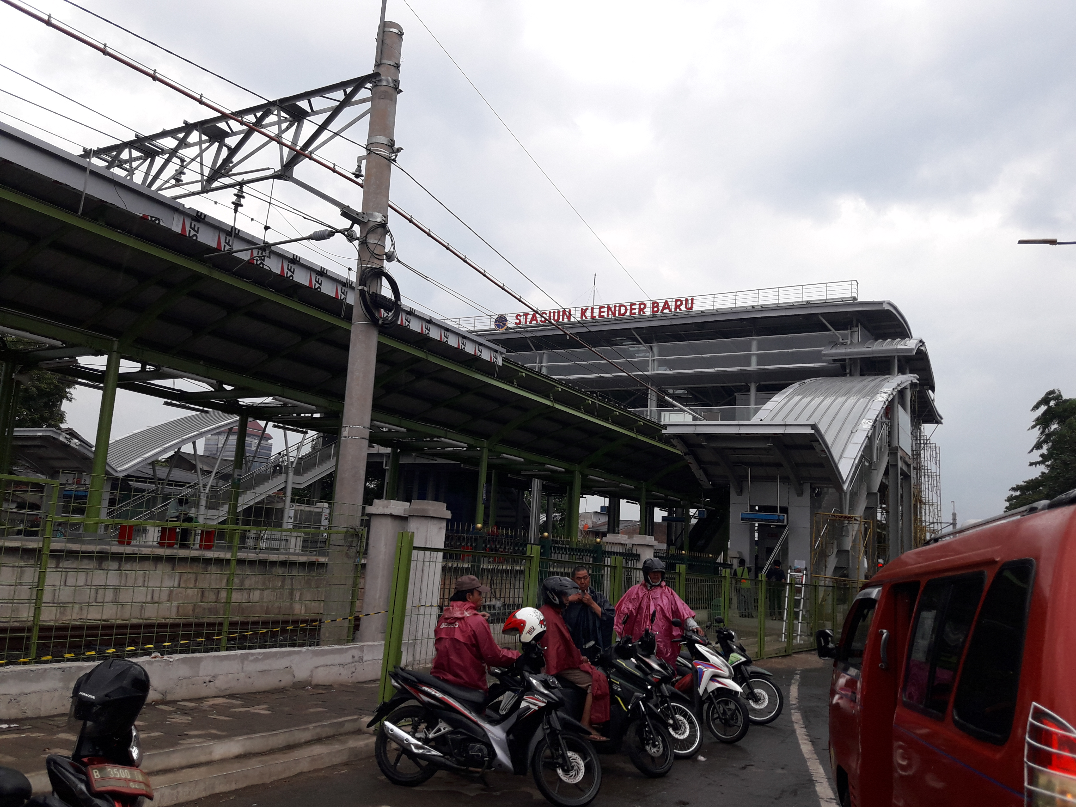 Pintu masuk Stasiun Klender Baru pada 8 Januari 2019.